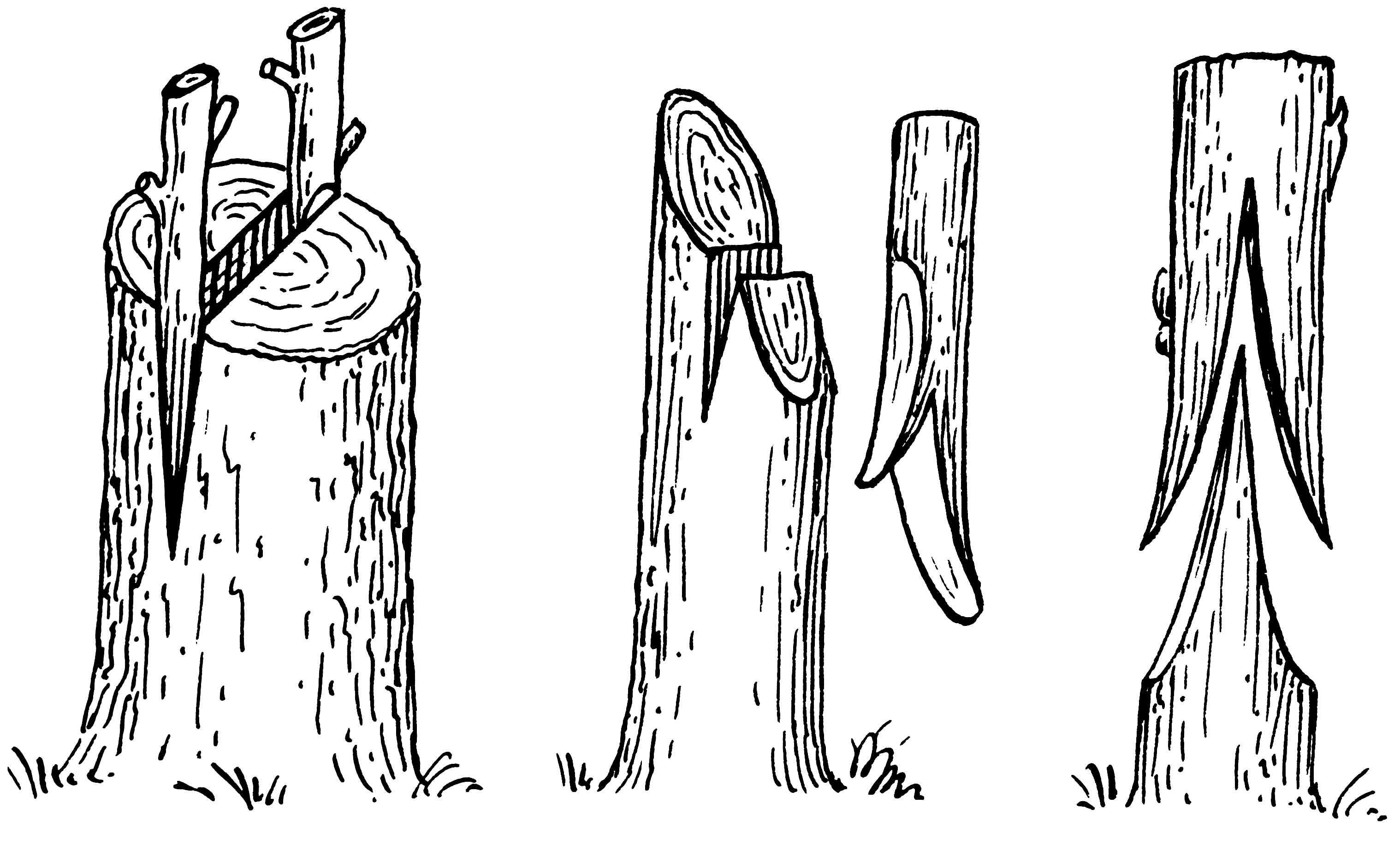 Graft